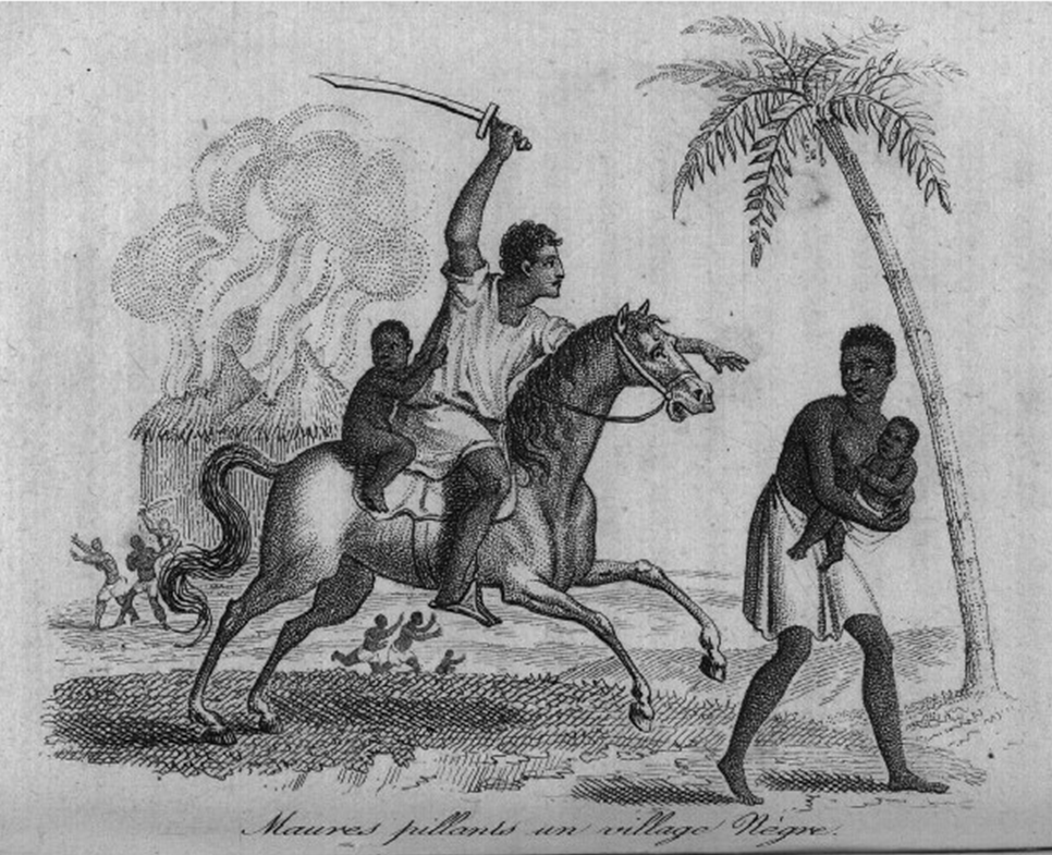 "Maures pillants un village nègre", planche de René Geoffroy de Villeneuve (1767-1831), L' Afrique, ou histoire, mœurs, usages et coutumes des Africains. Le Sénégal, orné de quarante-quatre planches, exécutées la plupart d'après les dessins originaux inédits, faits sur les lieux